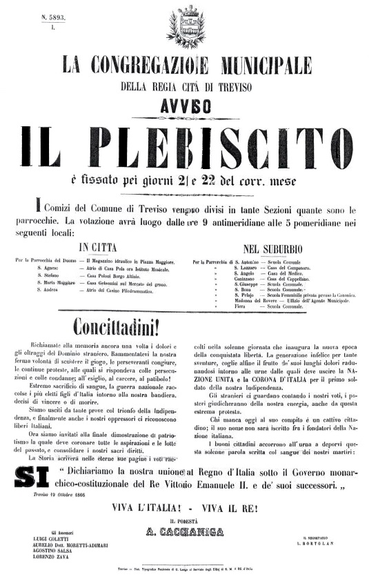 Comune di Treviso - convocazione del plebiscito di annessione del Veneto al regno d'Italia del 21-22 ottobre 1866